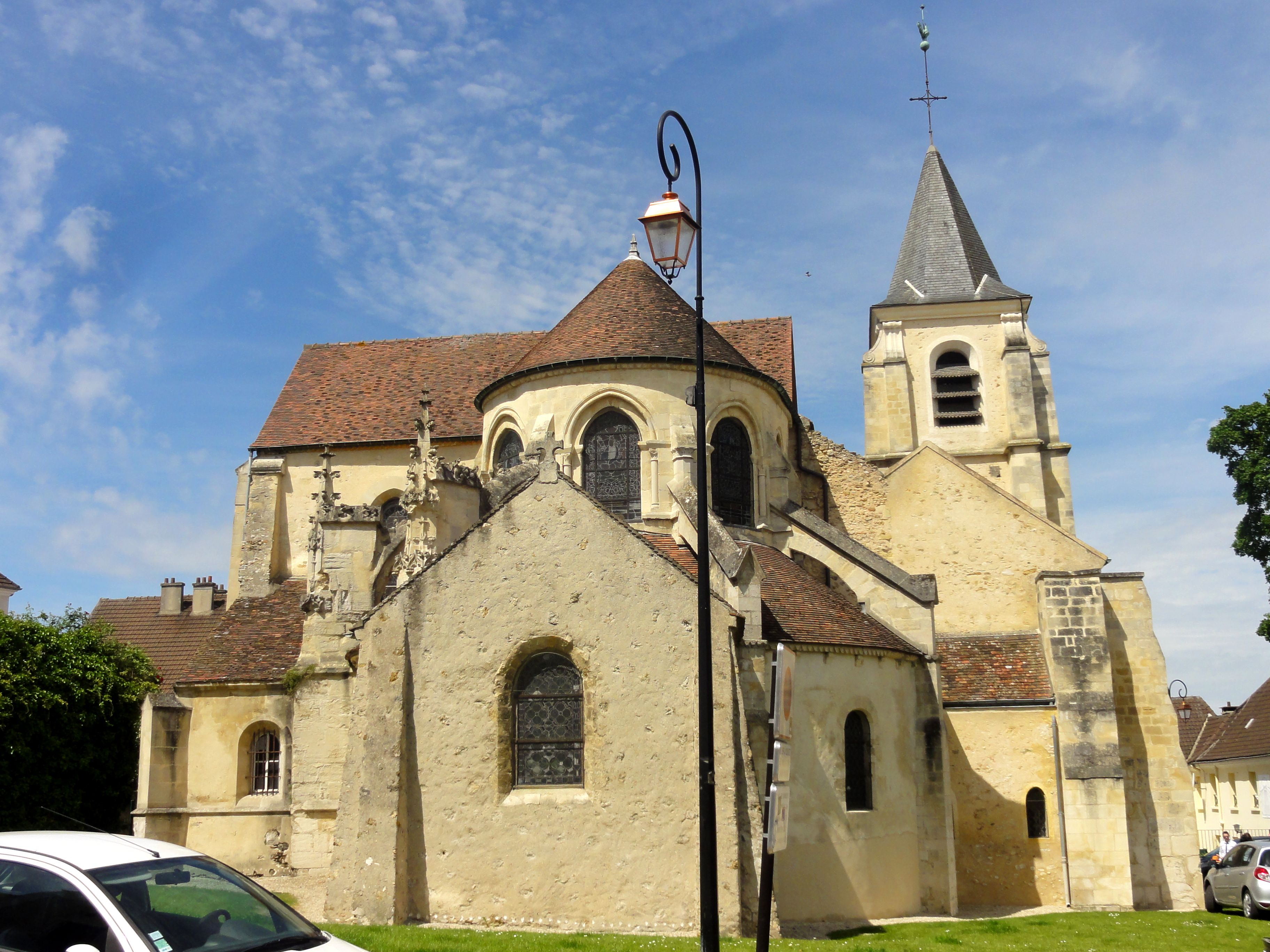 Chevet.